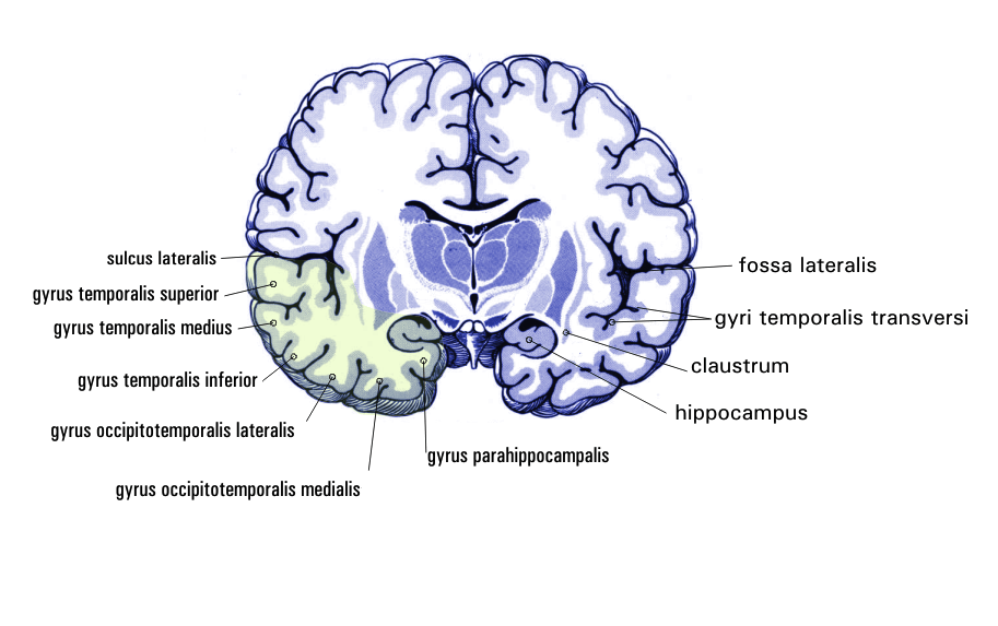 Gehirn frontalschnitt auf Höhe des hippocampus